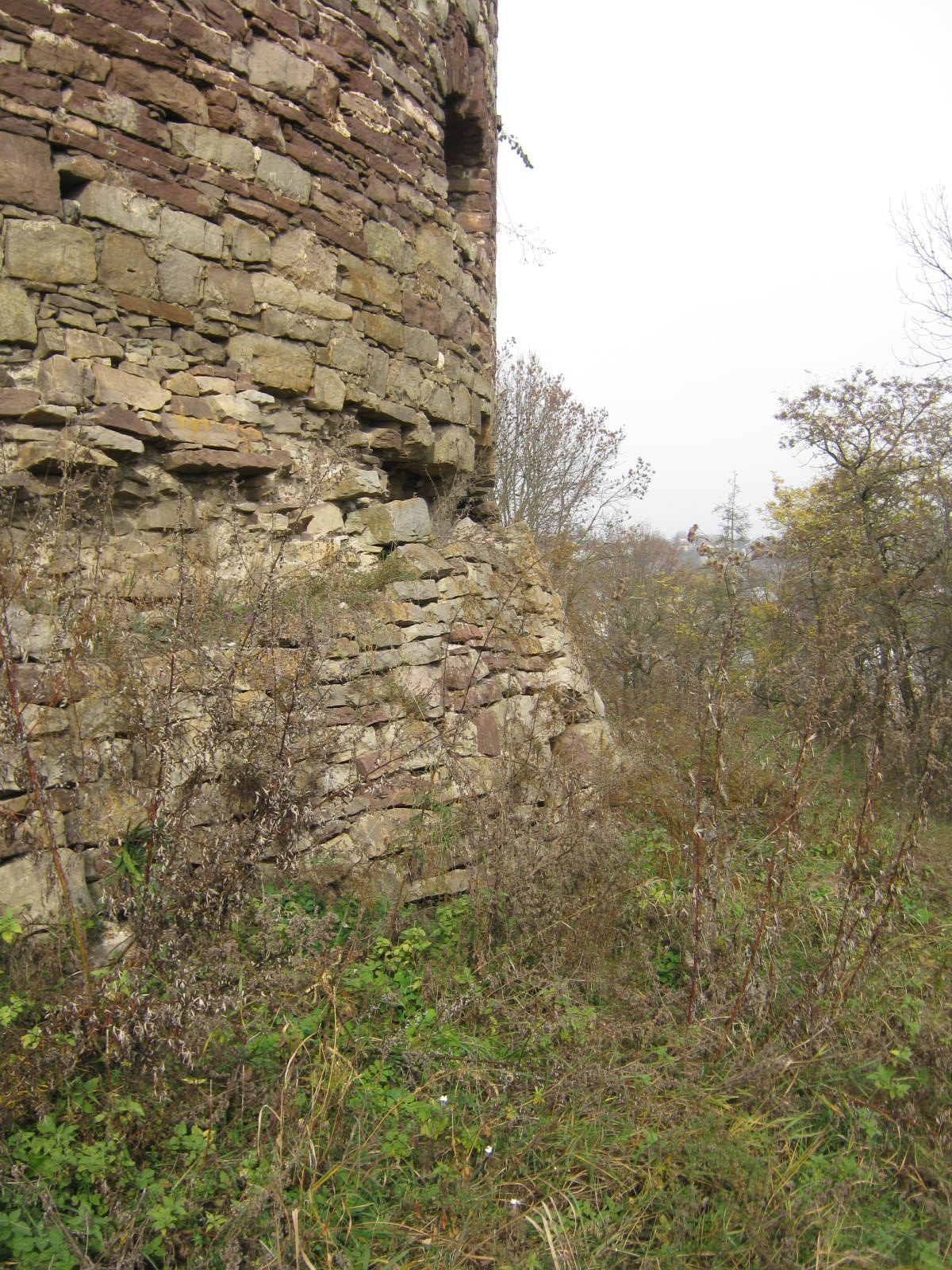 Основа вежі. Фортеця. Бучач